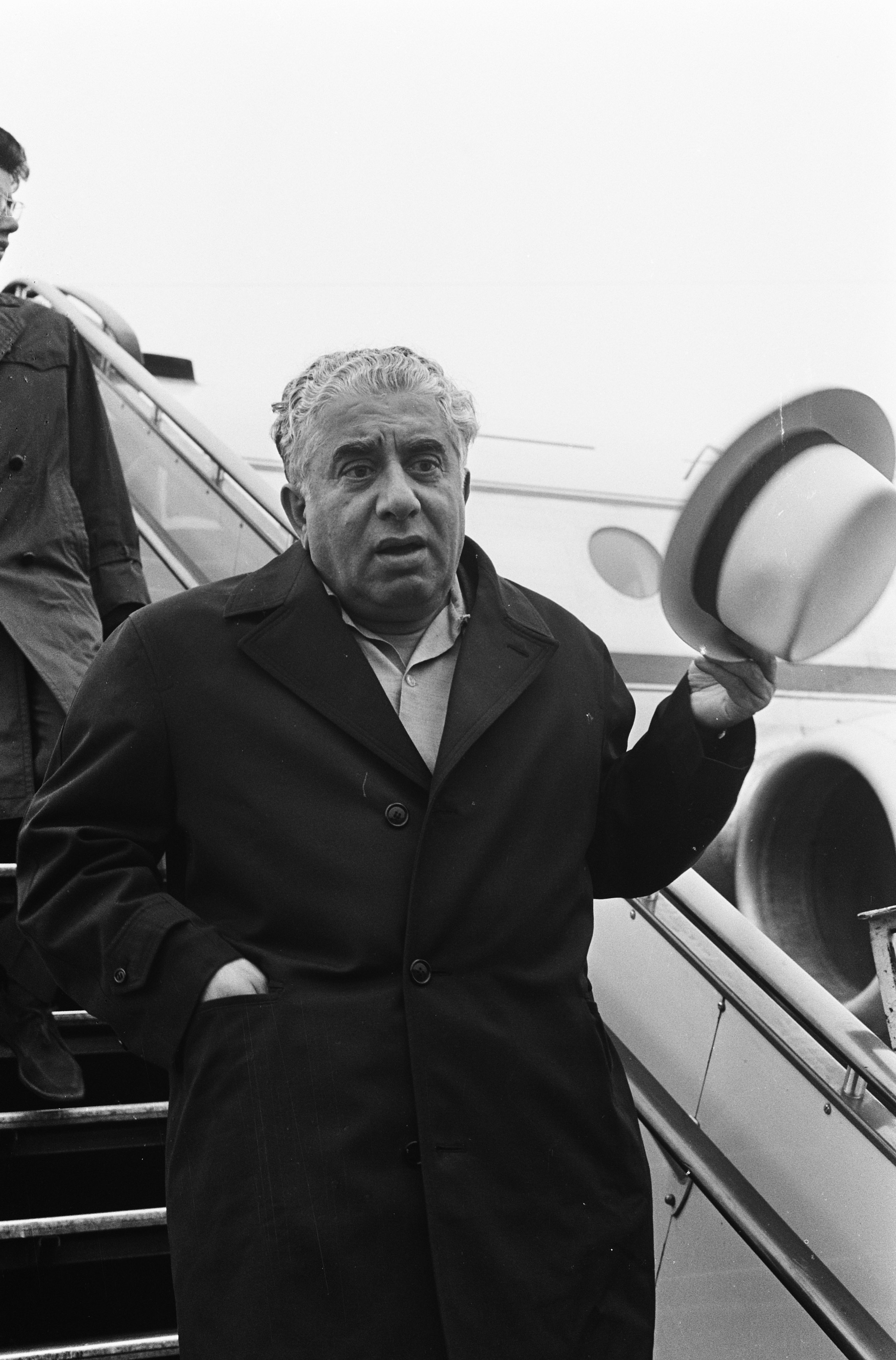 Collectie / Archief : Fotocollectie Anefo Reportage / Serie : [ onbekend ] Beschrijving : Aankomst Russische dirigent Khatsjatoerian op Schiphol Datum : 27 juli 1964 Locatie : Noord-Holland, Schiphol Trefwoorden : aankomsten, dirigenten Fotograaf : Pot, Harry / Anefo Auteursrechthebbende : Nationaal Archief Materiaalsoort : Negatief (zwart/wit) Nummer archiefinventaris : bekijk toegang 2.24.01.05 Bestanddeelnummer : 916-6860